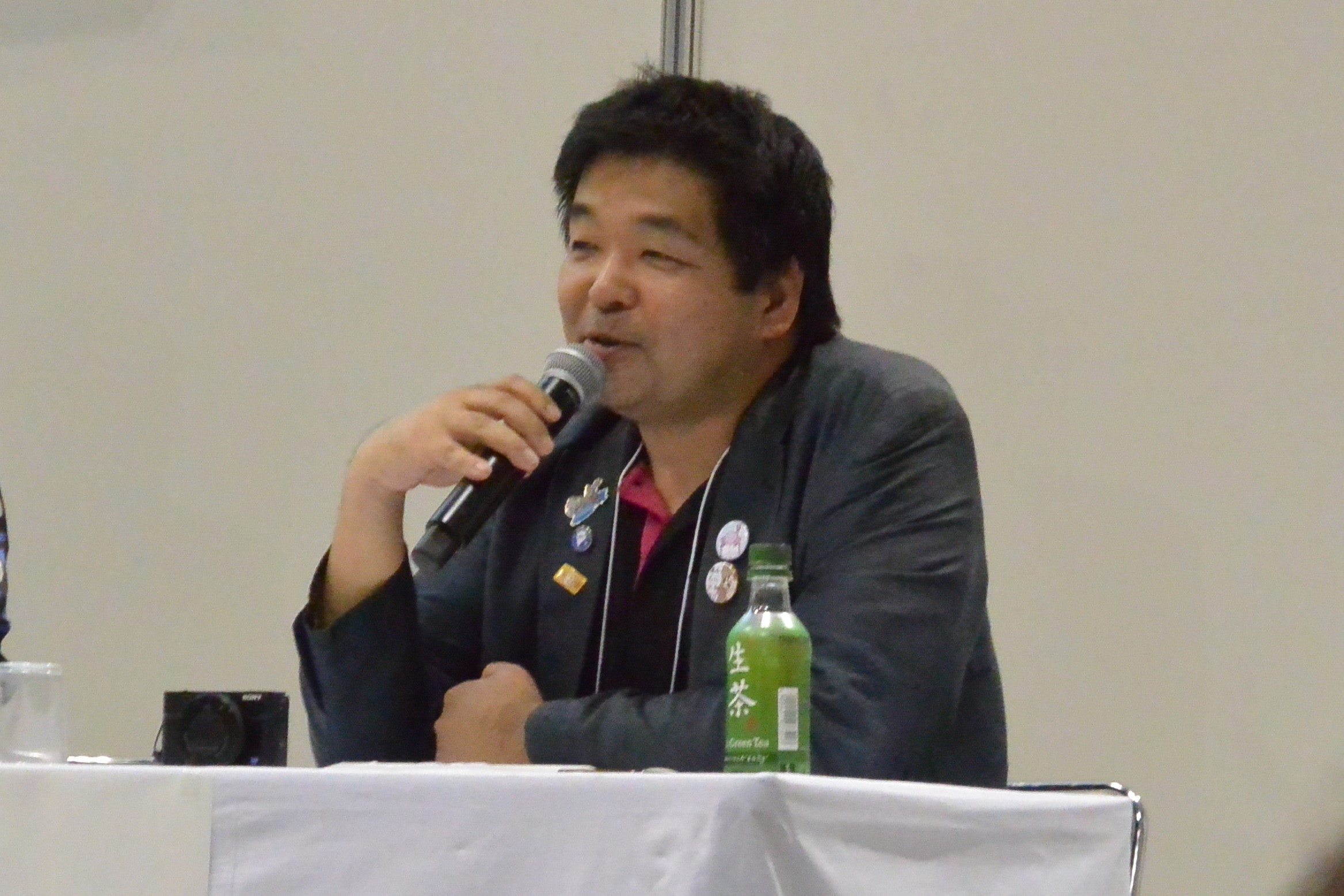 図書館総合展２０１７でライブラリーオブザイヤーの審査員を務める岡本真